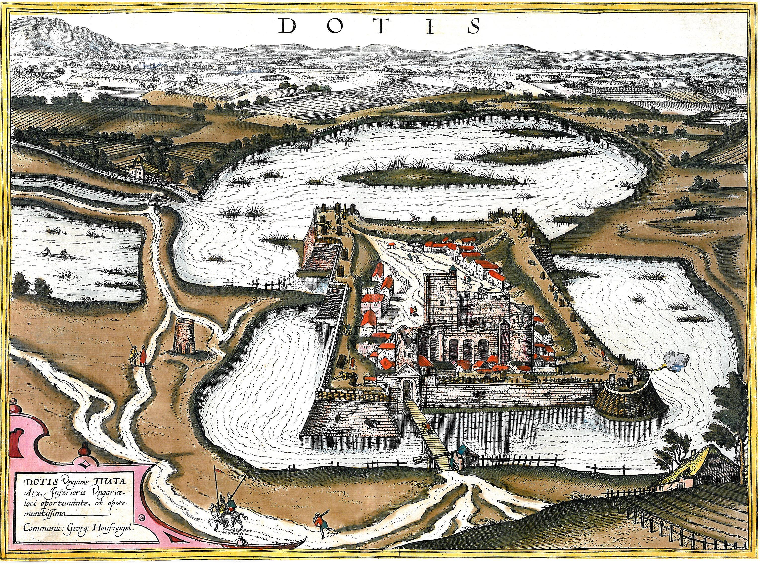 Tata G. Hoefnagel metszetén